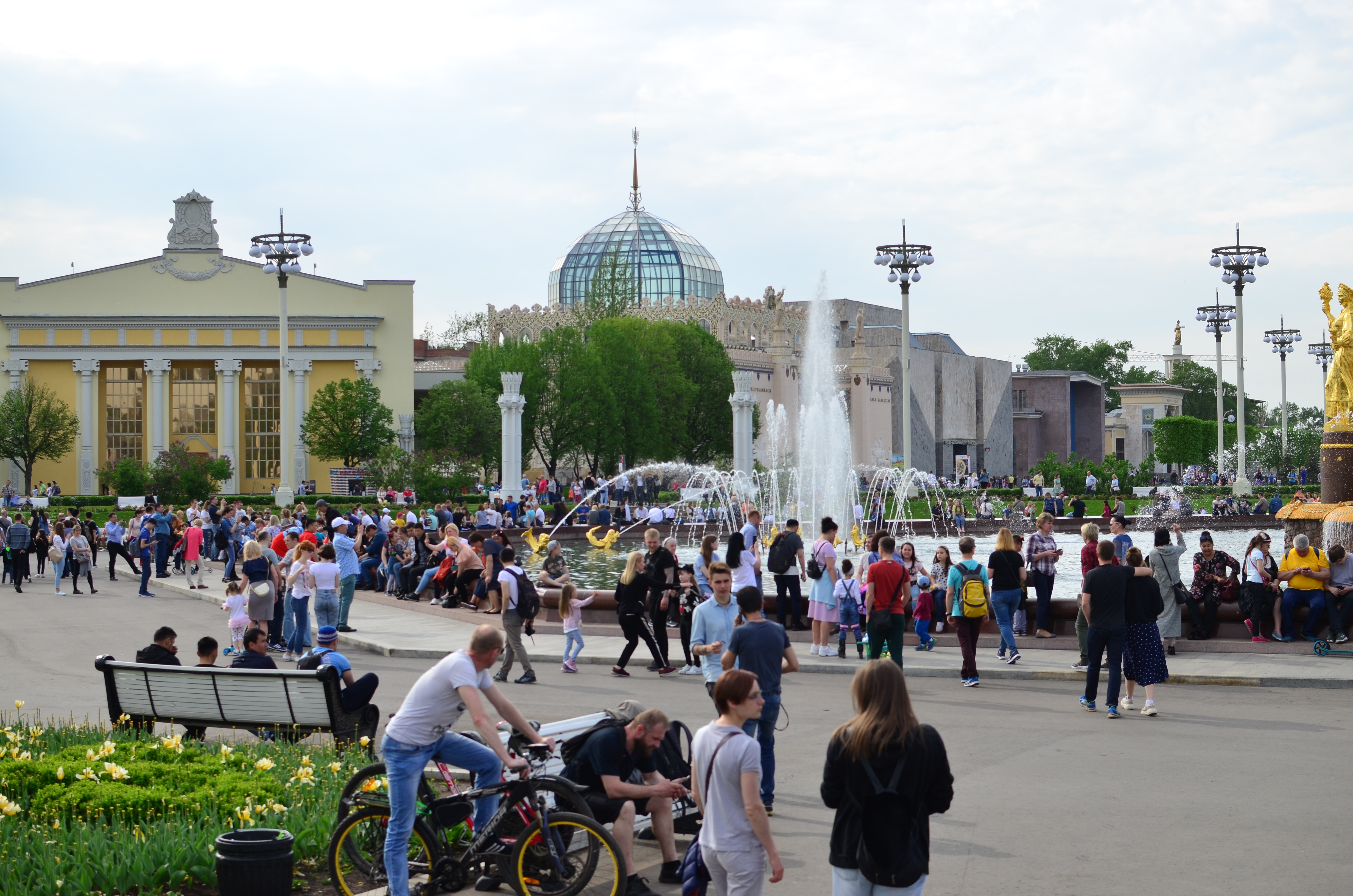 Территория выставки достижений народного хозяйства в Москве. Останкинский район.